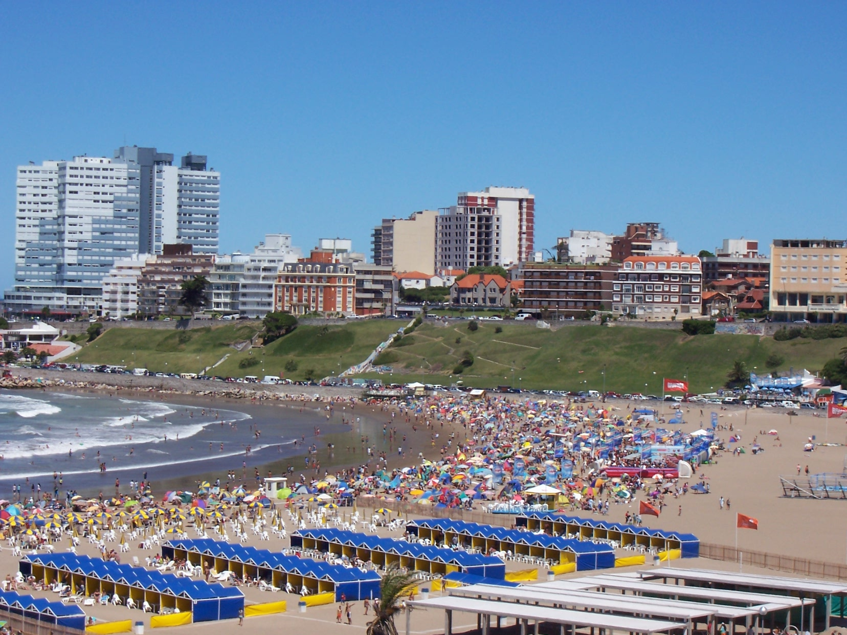 Изглед от Мар дел Плата с крайбрежието на Атлантически океан